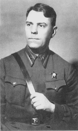 Александр Михайлович Василевский (1895 — 1977)